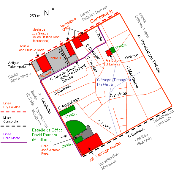 Mapa del sector Guabina de la ciudad de Cabimas, municipio Cabimas, estado Zulia, Venezuela